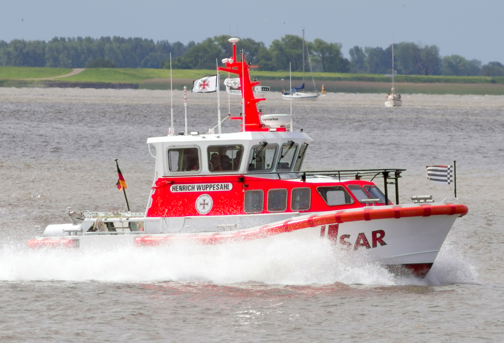 Seenotrettungsboot Henrich Wuppesahl bei der 150 Jahr Feier der DGzRS in Bremerhaven.